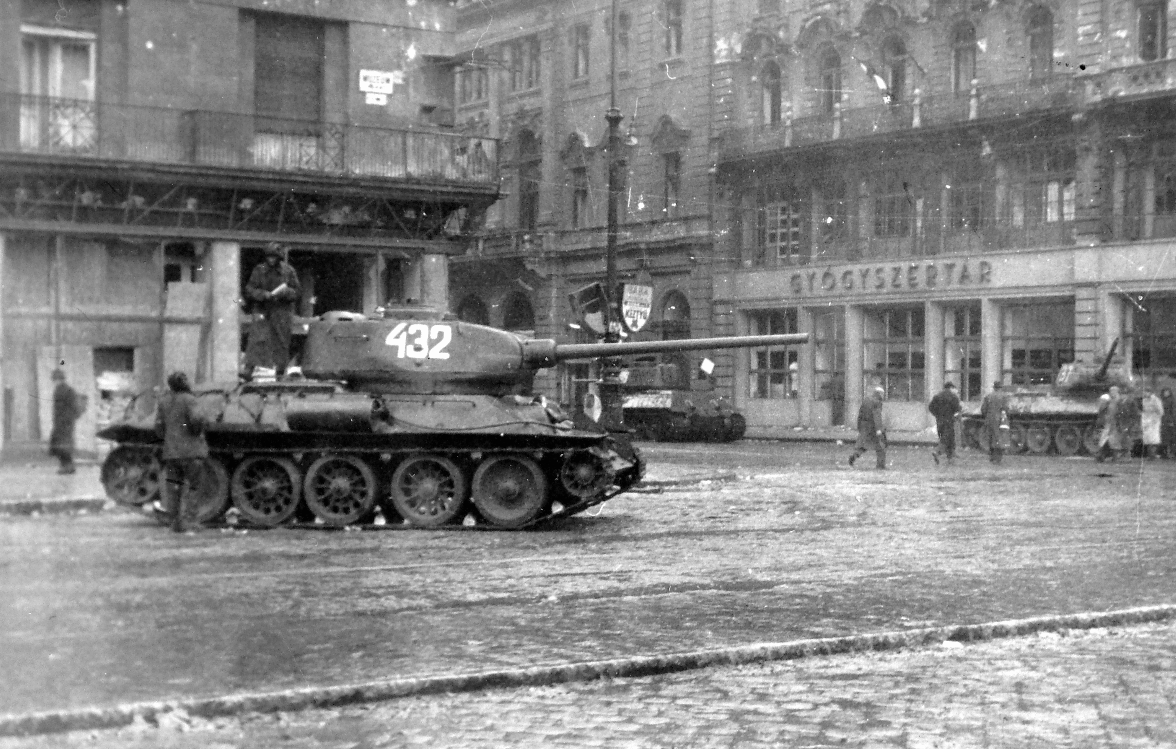 Astoria kereszteződés, szemben a Kossuth Lajos utca a Múzeum körút felől nézve. Location: Hungary, Budapest V. Tags: tank, street view, revolution, soldier, pedestrian, pharmacy, hotel, Budapest Title: Astoria kereszteződés, szemben a Kossuth Lajos utca a Múzeum körút felől nézve.